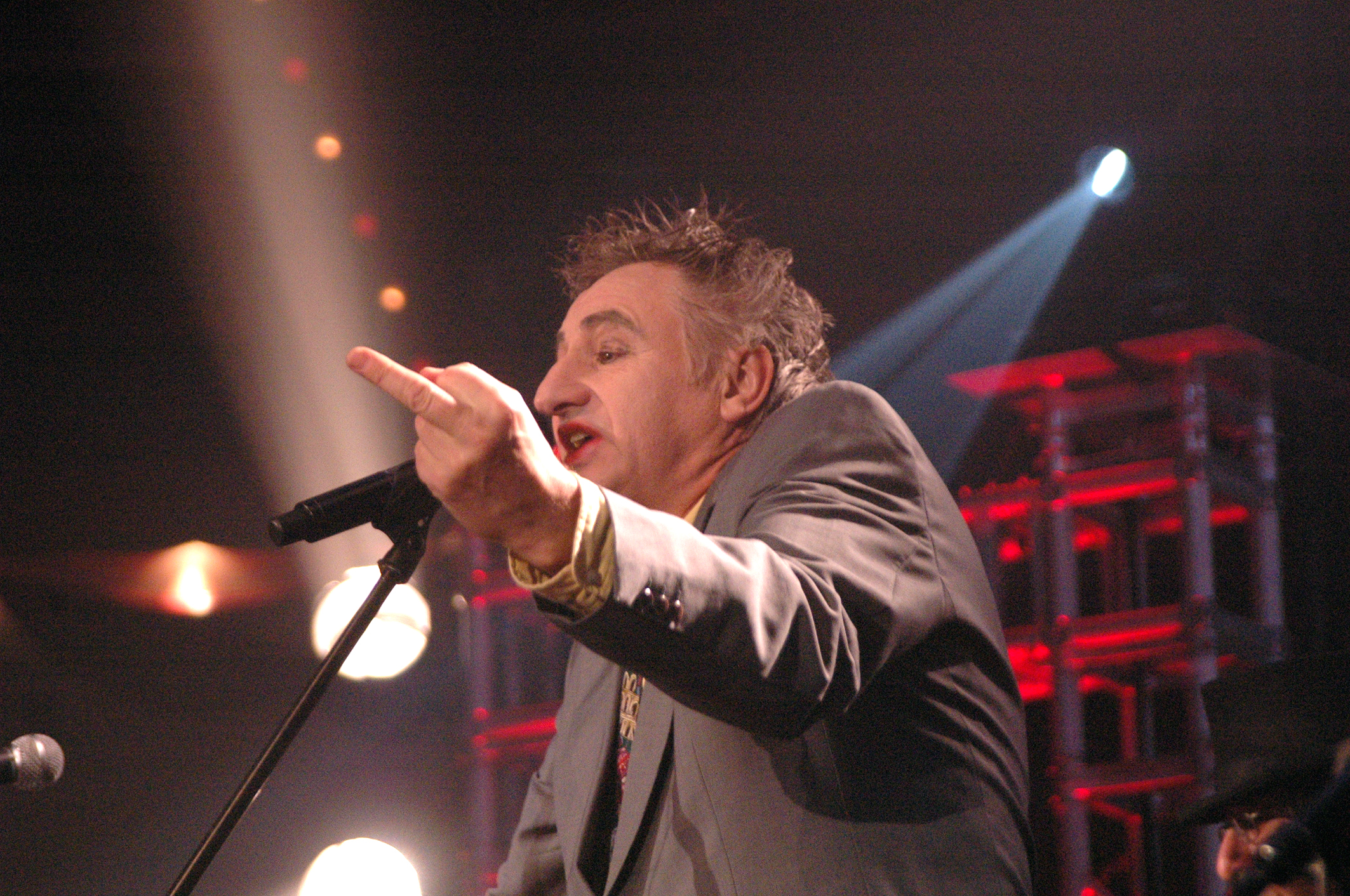 Georg Ringsgwandl als Gast bei der Spider Murphy Gang im Zirkus Krone, München 2008